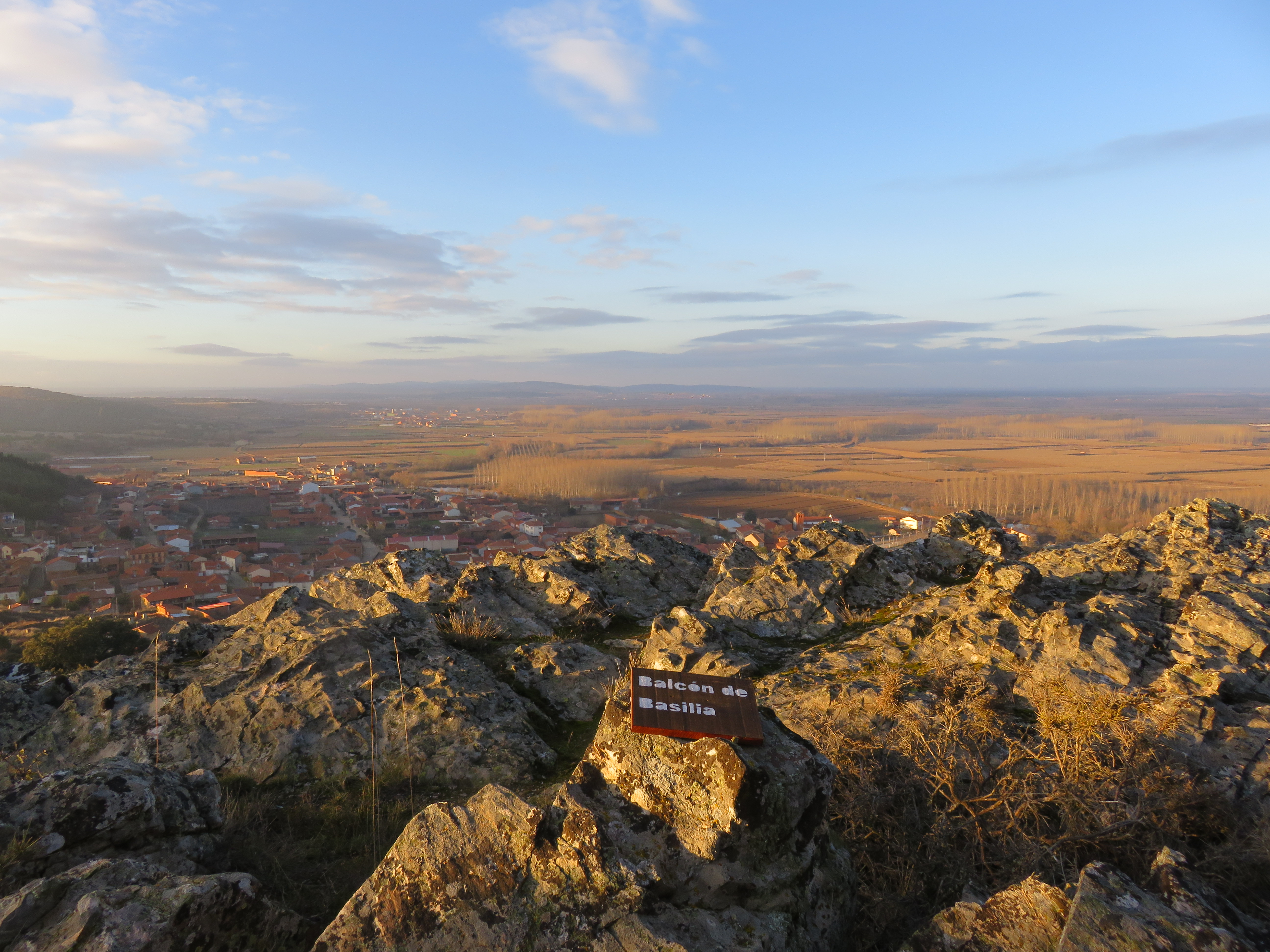 Mirador dentro de la Ruta 5. Sierra de Carpurias